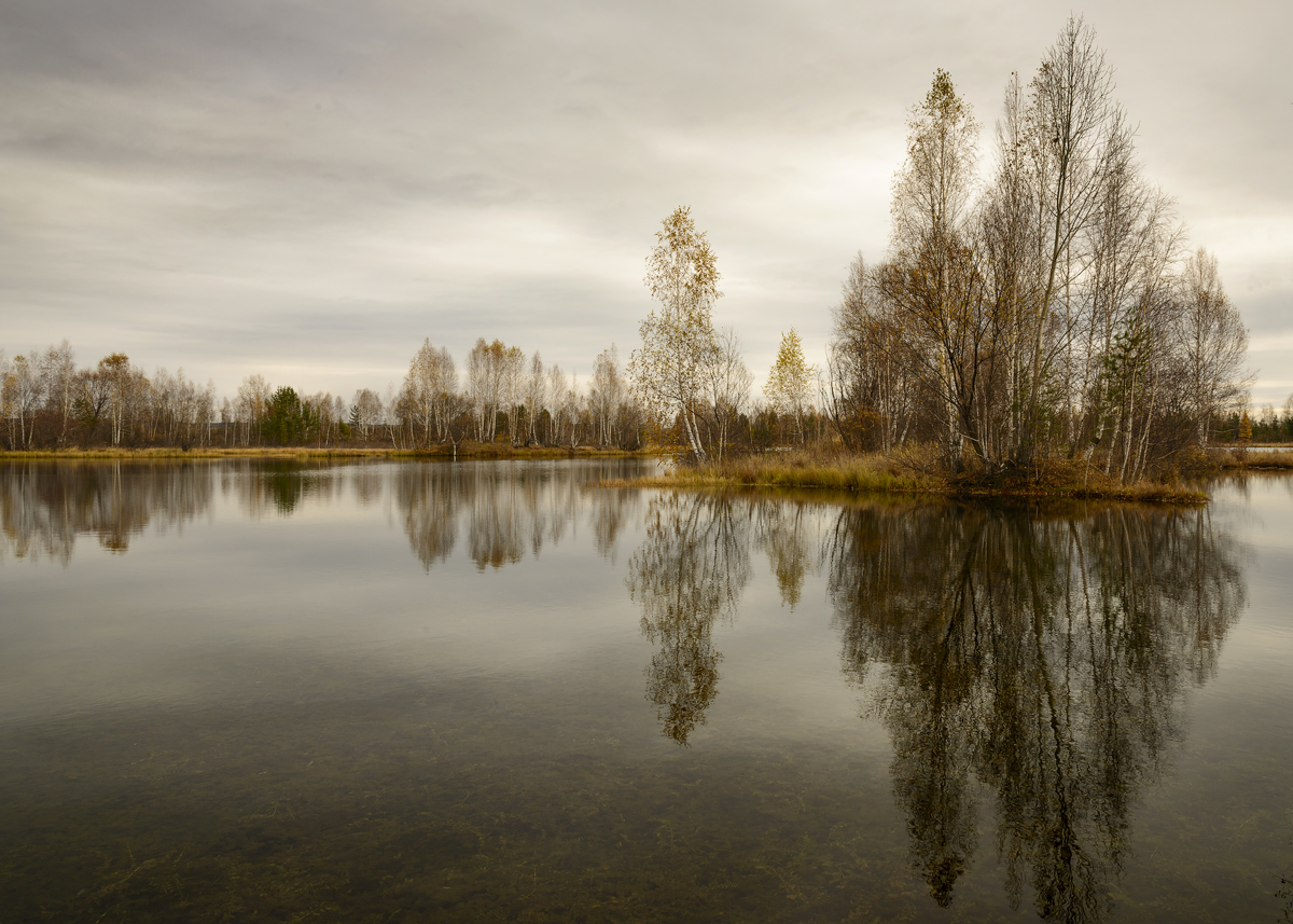 Природа рядом с городом Нижнеудинск. Иркутская область